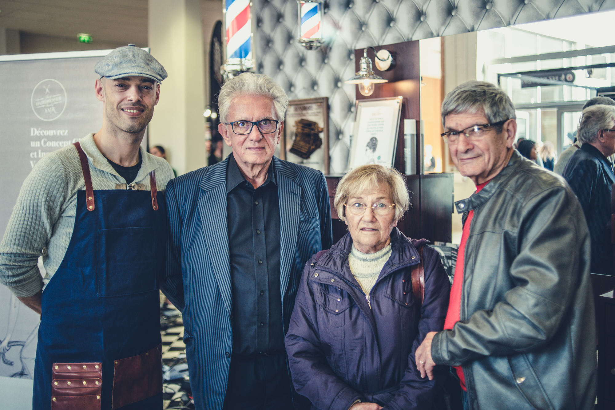 Jacques Seban & Gérard Chabert